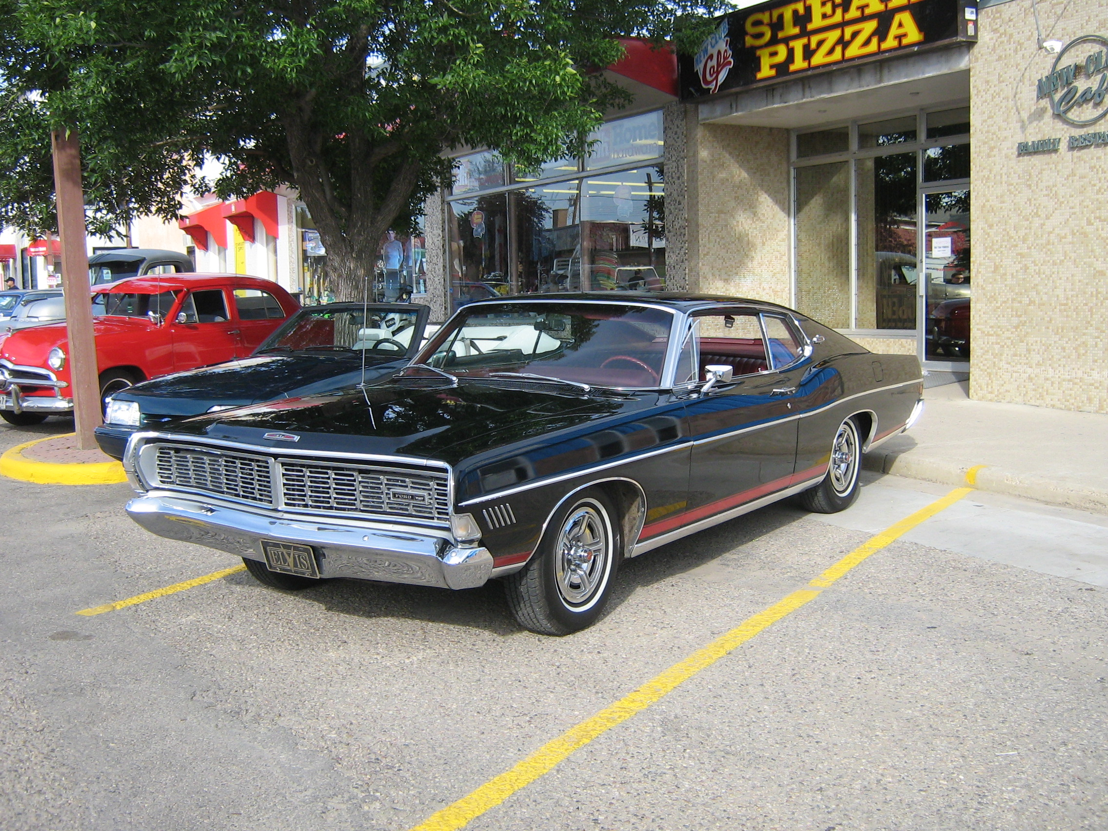 1968 Ford XL